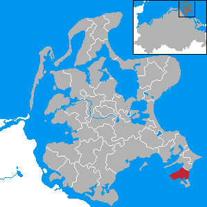 Gager, Landkreis Rügen, Mecklenburg-Vorpommern